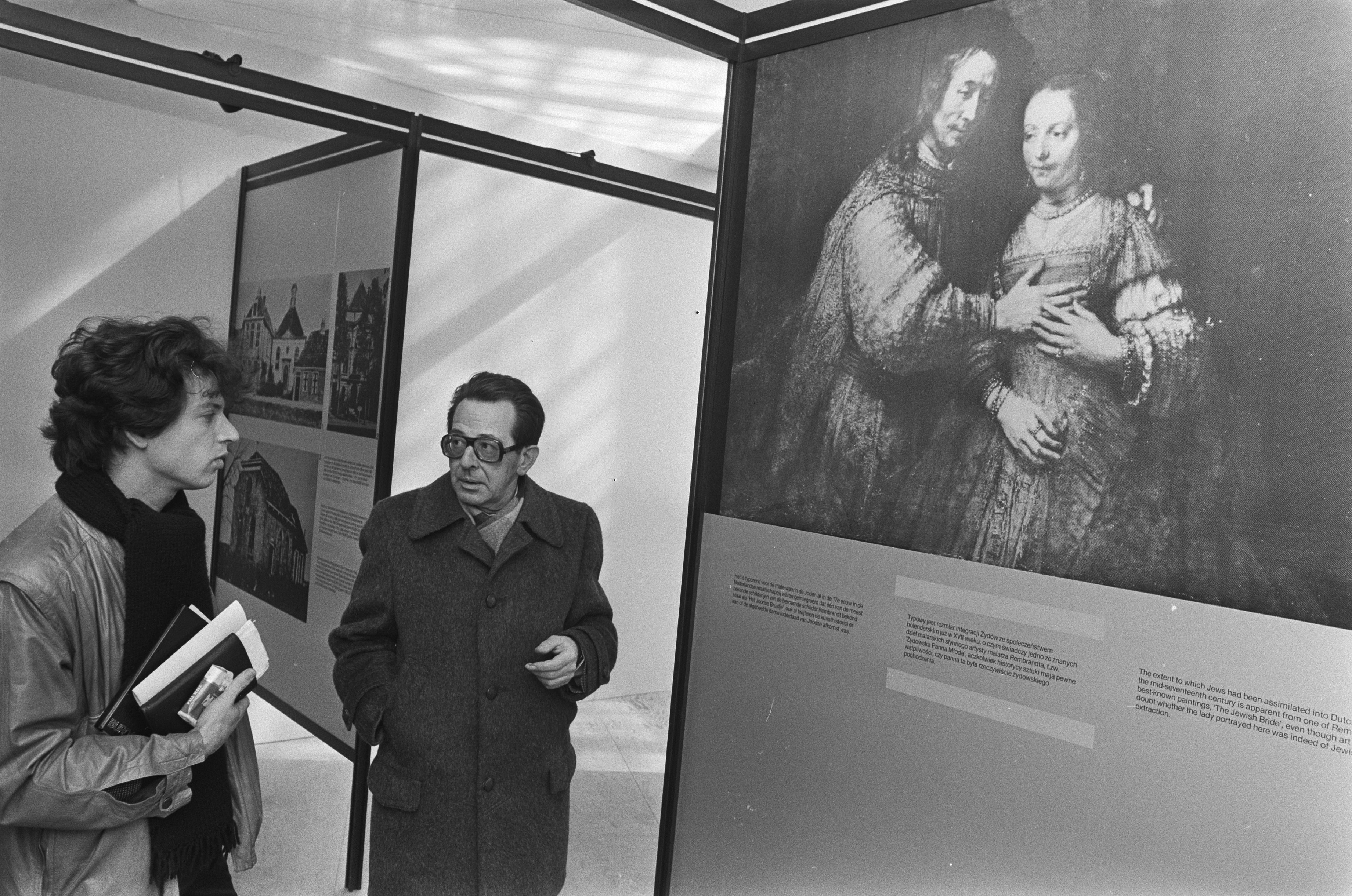 Collectie / Archief : Fotocollectie Anefo Reportage / Serie : [ onbekend ] Beschrijving : Persconferentie i.v.m. Auschwitz tentoonstelling in Zuiderkerk; RIOD directeur Paape bij reprodukt Joodse Bruid (Rembrandt) op tentoonstelling Datum : 9 april 1980 Trefwoorden : persconferenties, tentoonstellingen Persoonsnaam : Rijn, Rembrandt van Fotograaf : Bogaerts, Rob / Anefo Auteursrechthebbende : Nationaal Archief Materiaalsoort : Negatief (zwart/wit) Nummer archiefinventaris : bekijk toegang 2.24.01.05 Bestanddeelnummer : 930-7620